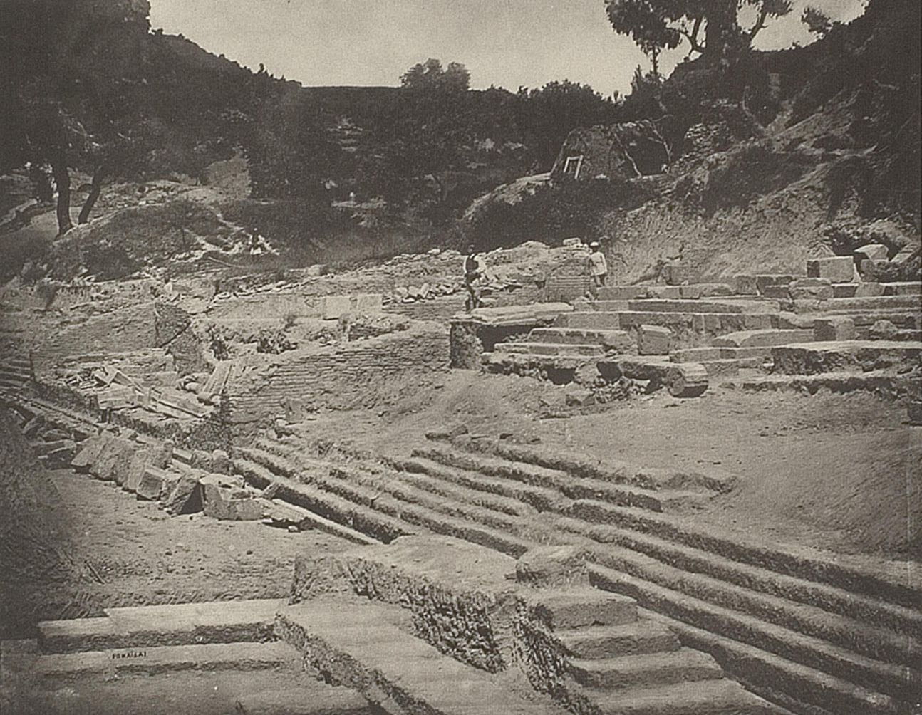 Die Exedra des Herodes Atticus, das Westende der Thesaurenterrasse und ganz im Vordergrunde die NW.-Ecke des stark zerstörten Metroon-Stylobates mit dem einzig noch übrigen Säulenreste. Am Fusse der Terrassenstufen läuft die Rinne hin, in die sich das Wasser aus dem Sammelbassin der Exedra ergoss. Rechts im Mittelgrunde die Fundamentreste der westlichen Thesauren von dem Unterbaue eines Altars überragt (nach Adler der von Paus. V, 14, 9 in der Nähe des sikyonischen Thesauros erwähnten Heraklesaltars). Derselbe ist ebenso wie der nördliche Scheitel des Exedrahalbrunds durch eine Gestalt markirt. Rechts oben der Fuss des Kronion.